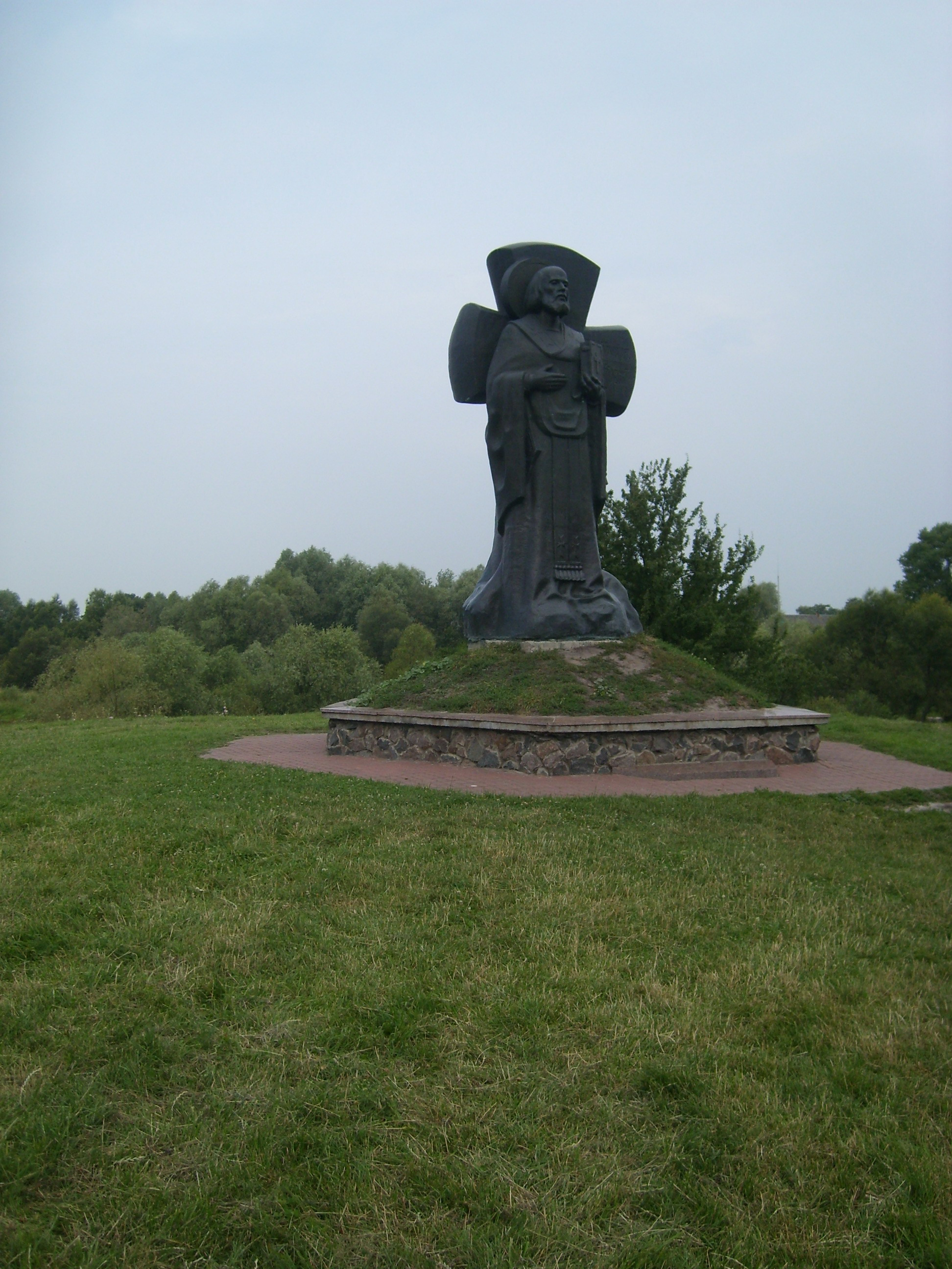 Беларуская (тарашкевіца): Гарадзішча старажытнага Турава пэрыяду раньняга сярэднявечча. г. Тураў This is a photo of Belarusian heritage monument. Reference number: 313В000360 ( WLM)